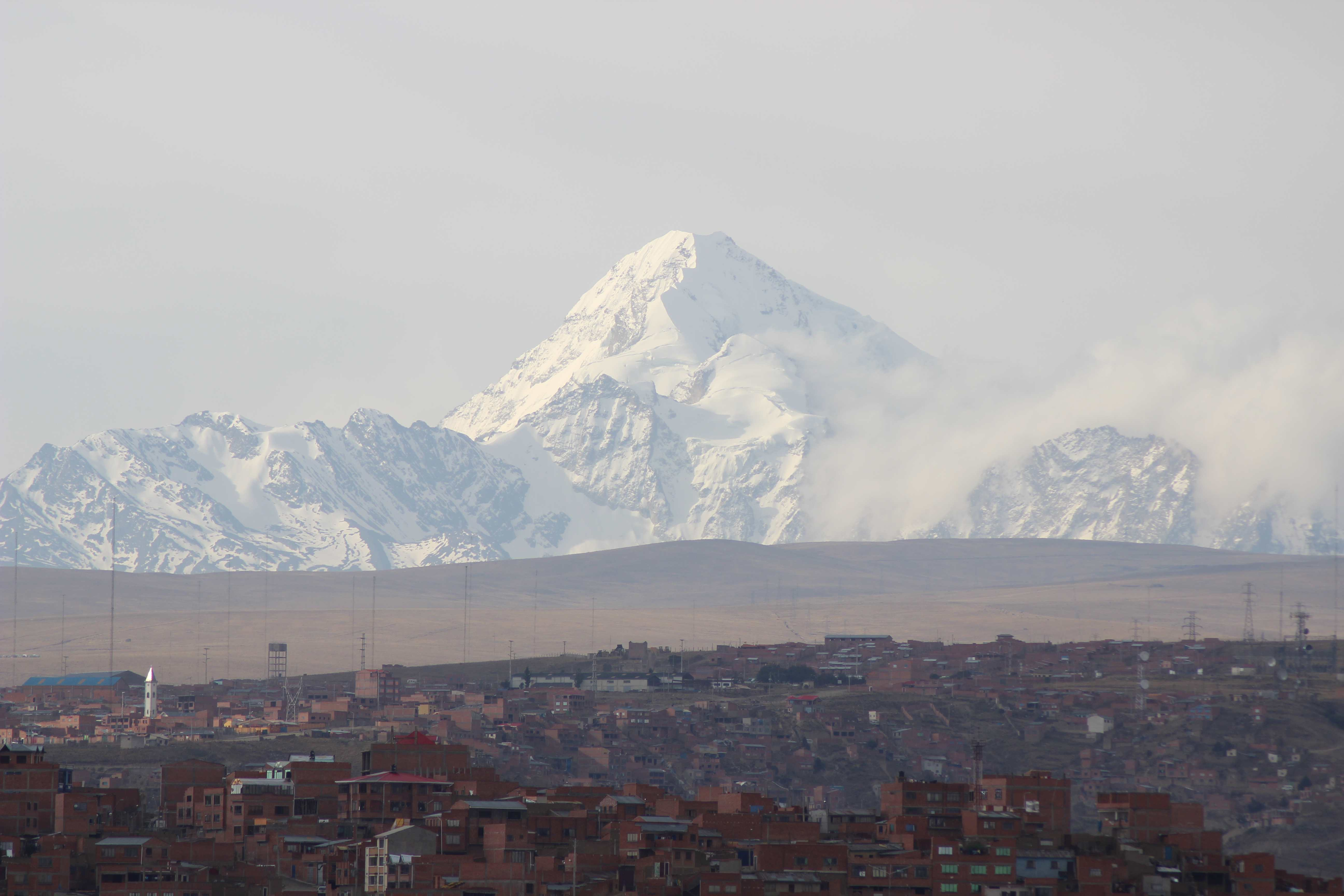 Blick auf die Südseite des Huayna Potosi von La Paz aus